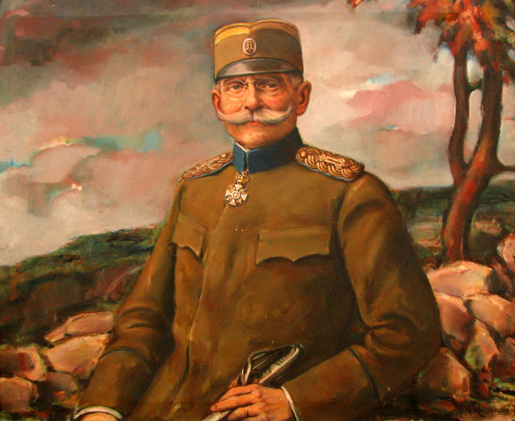 Слика: Портрет Павла Јуришића Штурма Аутор: Михаило Миловановић (1879-1941) Фотографисао: Бранко Д. Тодоровић